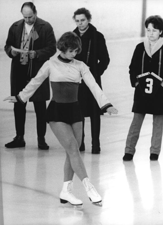 Sonja Morgenstern ADN-ZB Mittelstädt 17.12.1971 Berlin: DDR-Eiskunstlaufmeisterschaften im Berliner Sportforum.- Die Titelverteidigerin bei den Damen, Sonja Morgenstern (SC Karl-Marx-Stadt), liegt nach der Pflicht (Foto) am 17.12.1971 mit Platzziffer 7 und 923,70 Punkten in Führung.